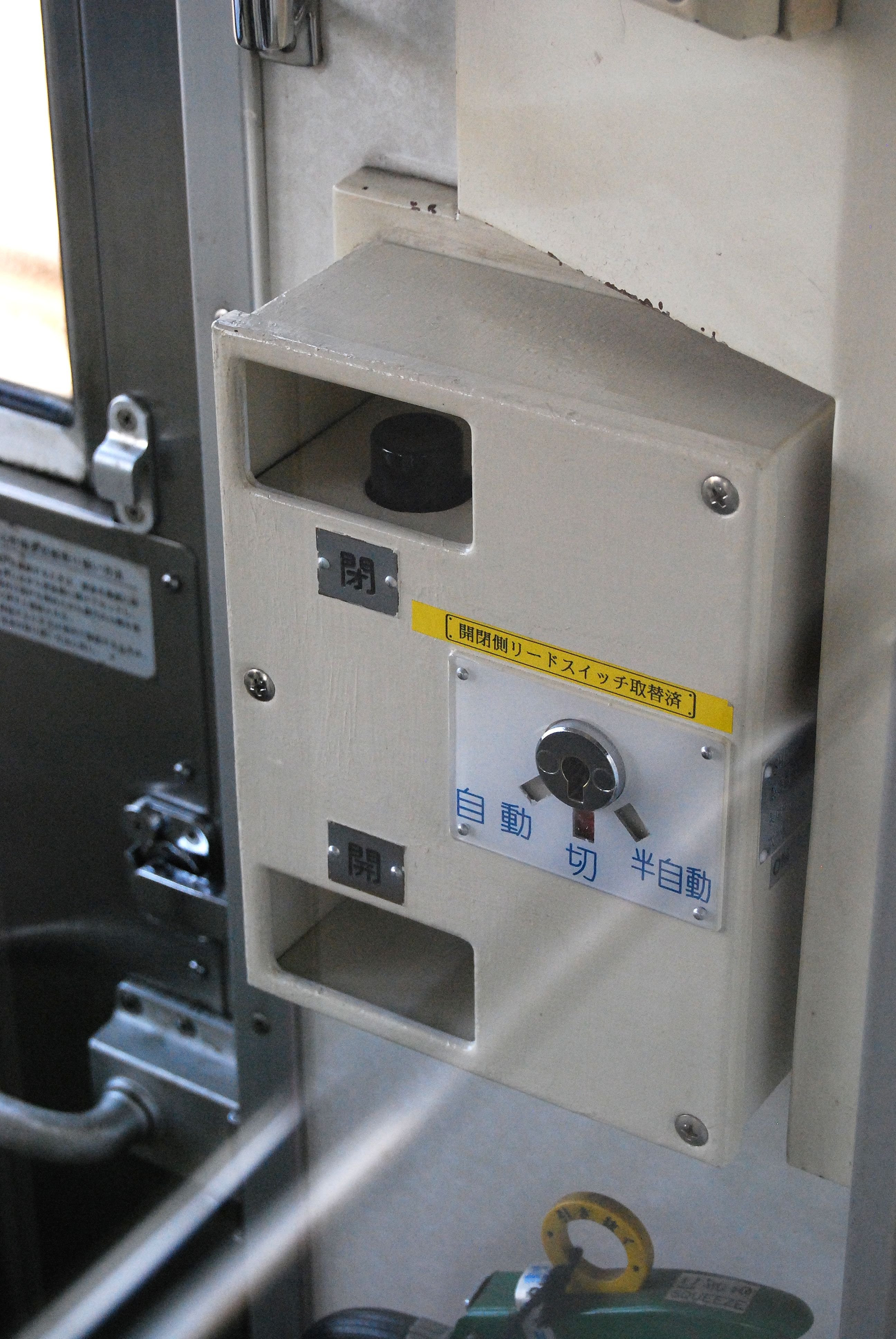 205系500番台の車掌スイッチ（乗務員室の窓越しから撮影）